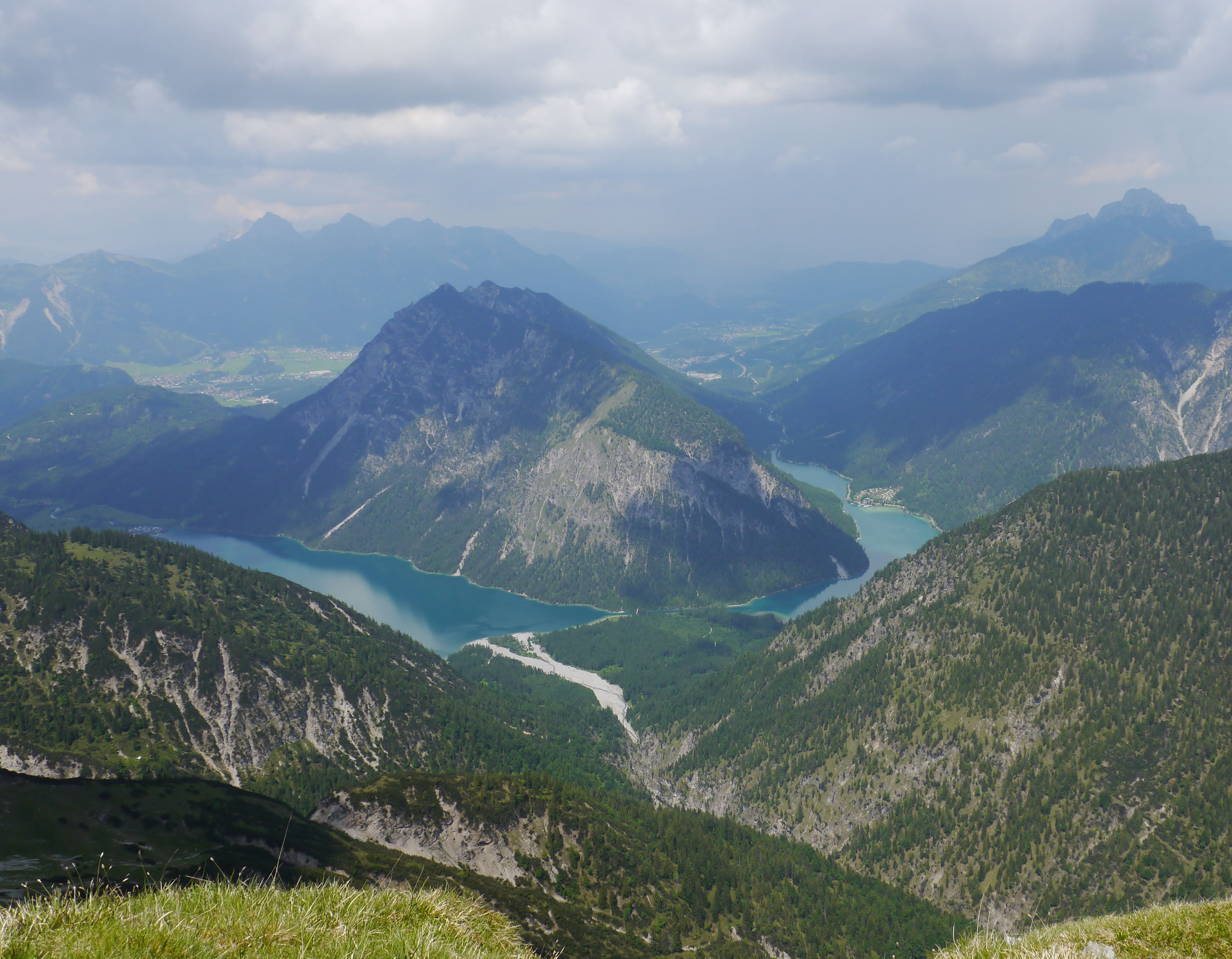 Blick vom Pitzenegg nach Westen. Links der Heiterwanger See, rechts Teile des Plansees.